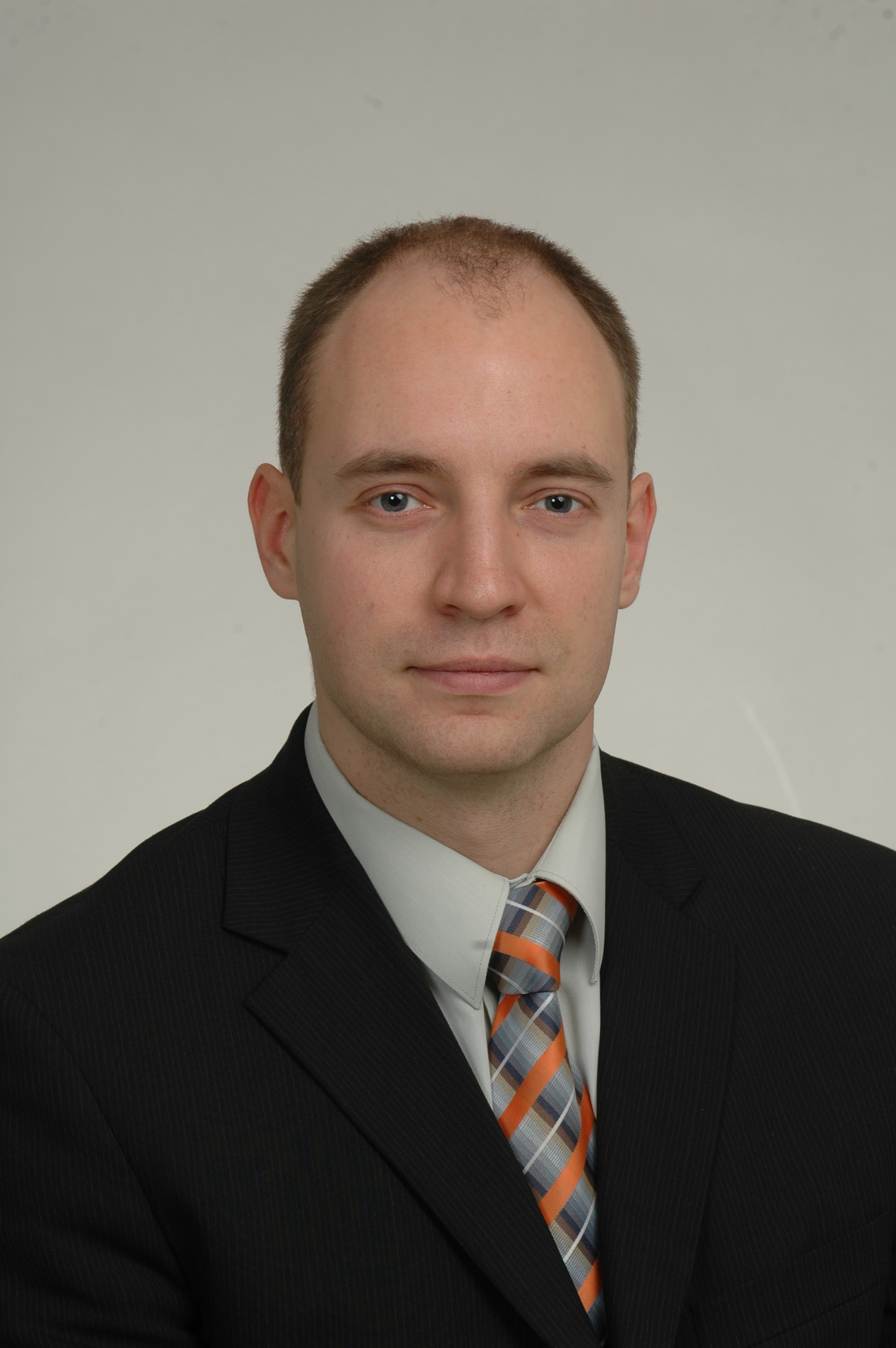 Foto: Saeima